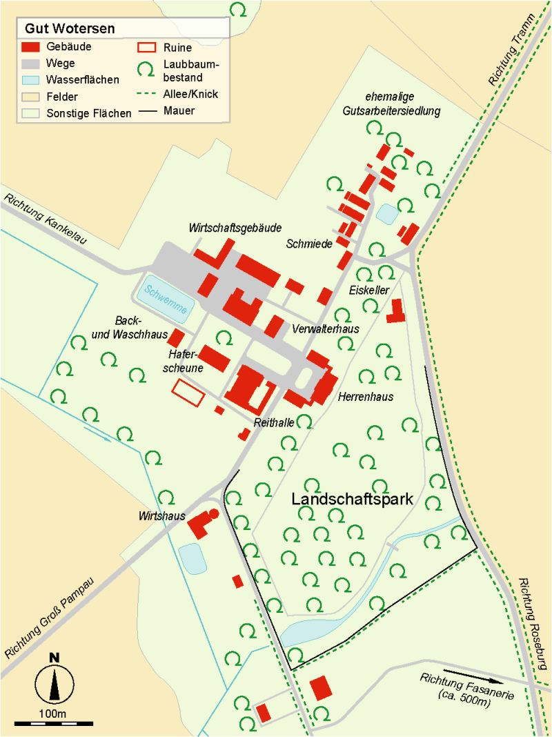 Gut Wotersen in Schleswig-Holstein